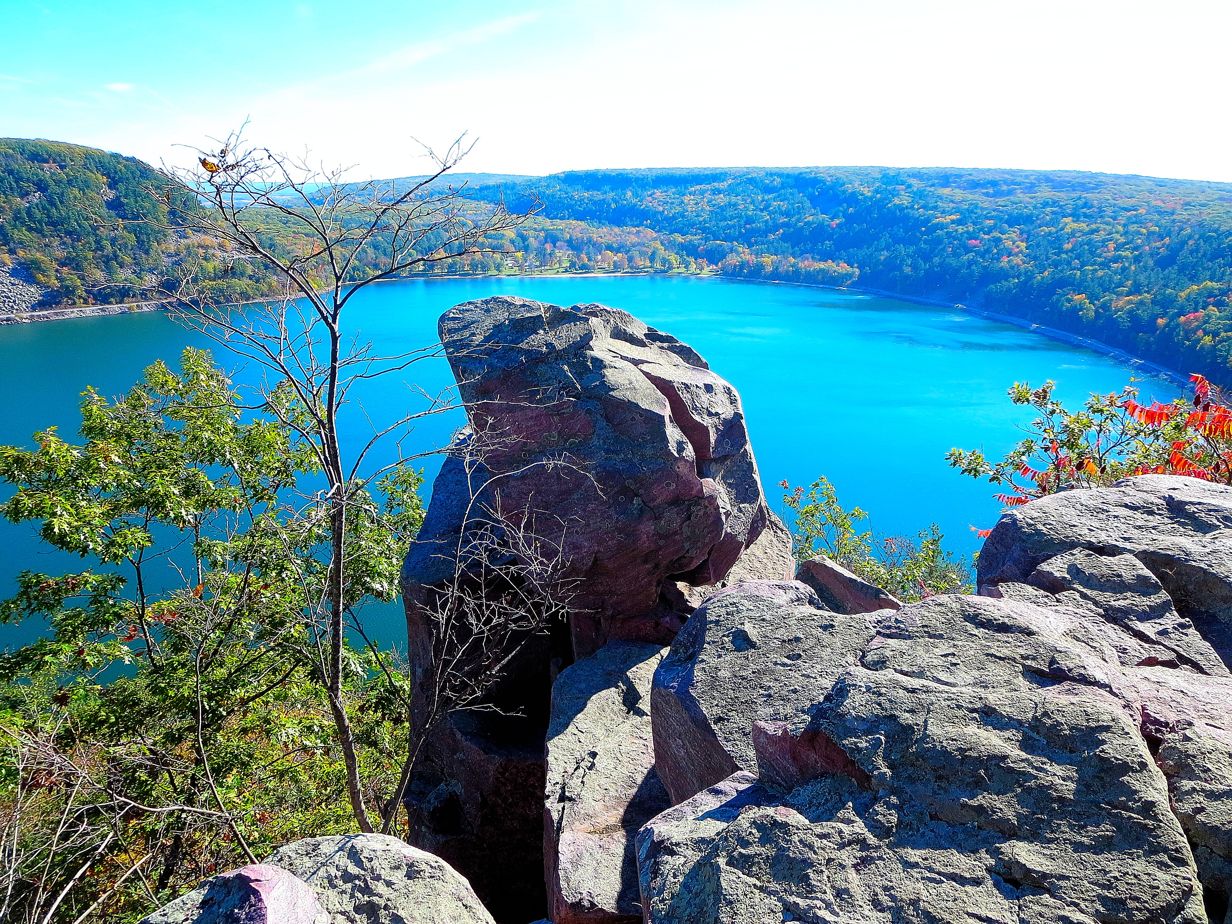 Tablet Rock